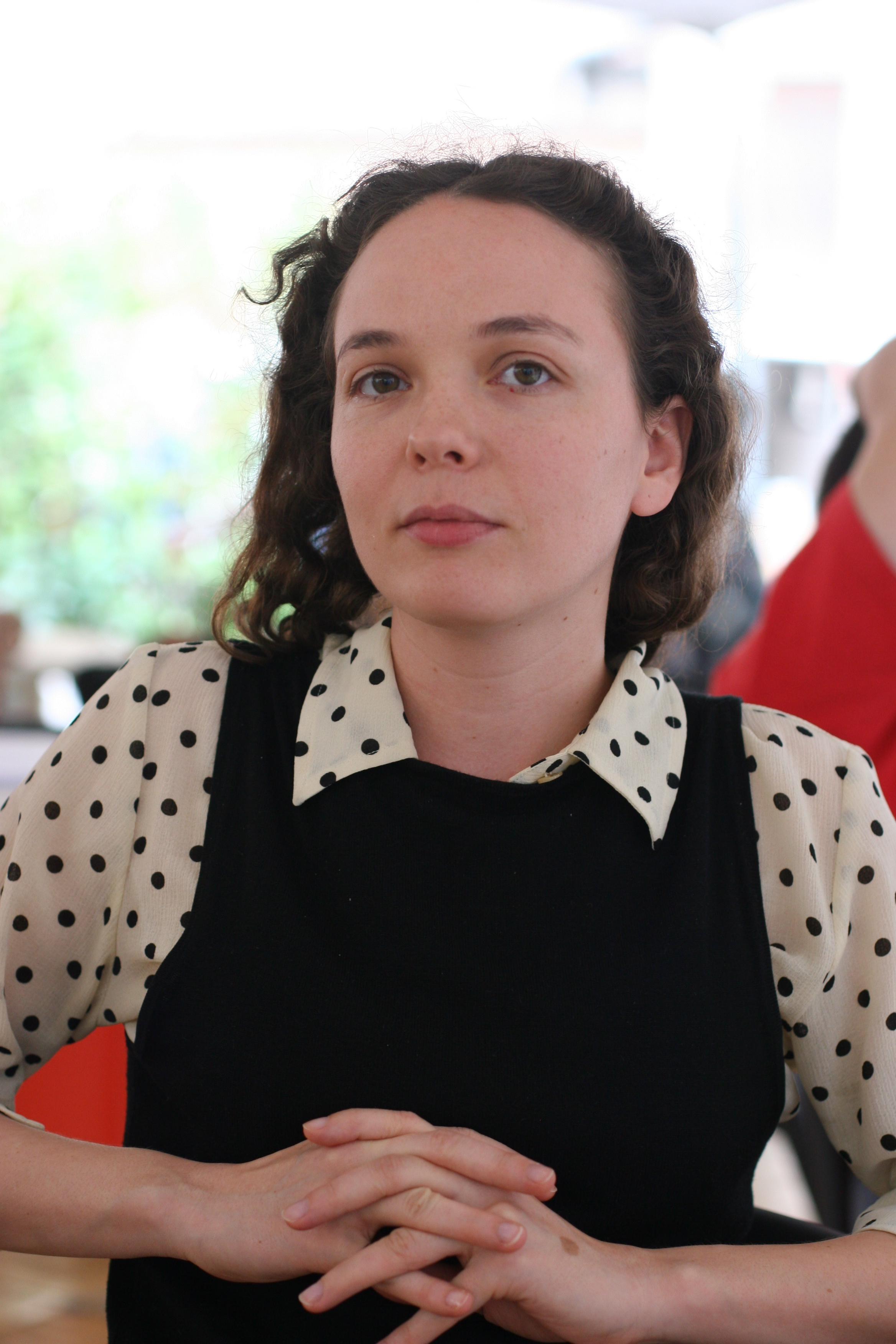 Guðrún Eva Mínervudóttir al Festivaletteratura di Mantova.